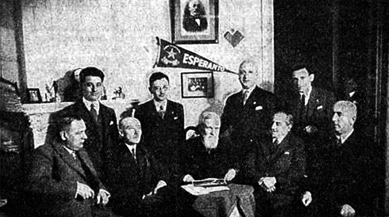 La Organiza Komitato de la VI-a Tutpollanda Kongreso de Esperanto en Varsovio je Pentekosto 1933. Sidas (de maldekstre): inĝ. Jan Skrzypiński, vicprezidanto de la Organiza Komitato — ministeria konsilando Kazimierz Zajączkowski, prezidanto — Prof. D-ro Odo Bujwid, prezidanto de PED, Kraków — D-ro Wilhelm Róbin, vicprezidanto de la Organiza Komitato — Piotr Nowakowski, komitatano. Staras (de maldekstre): Red. Oskar Berman, komitatano — Mgr. Isaj Dratver, ĝenerala sekretario — D-ro Edvard Wiesenfeld, kasisto — Severin Piernik, sekretario.